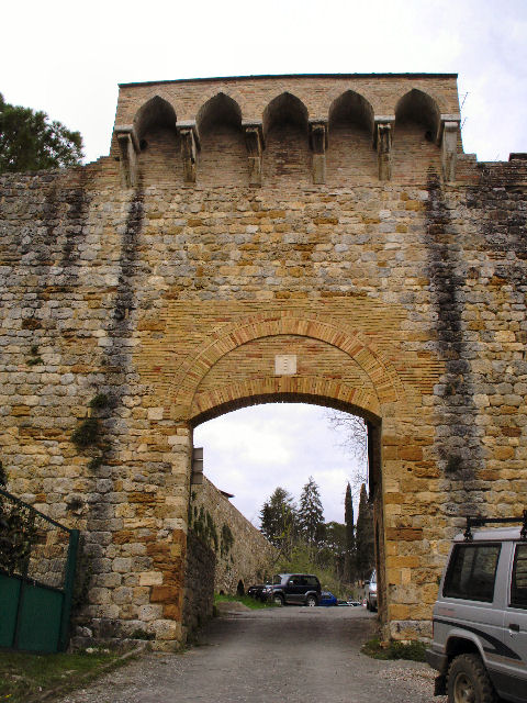 San Gimignano porta delle fonti esterno